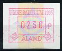 Автоматная марка Аландских островов